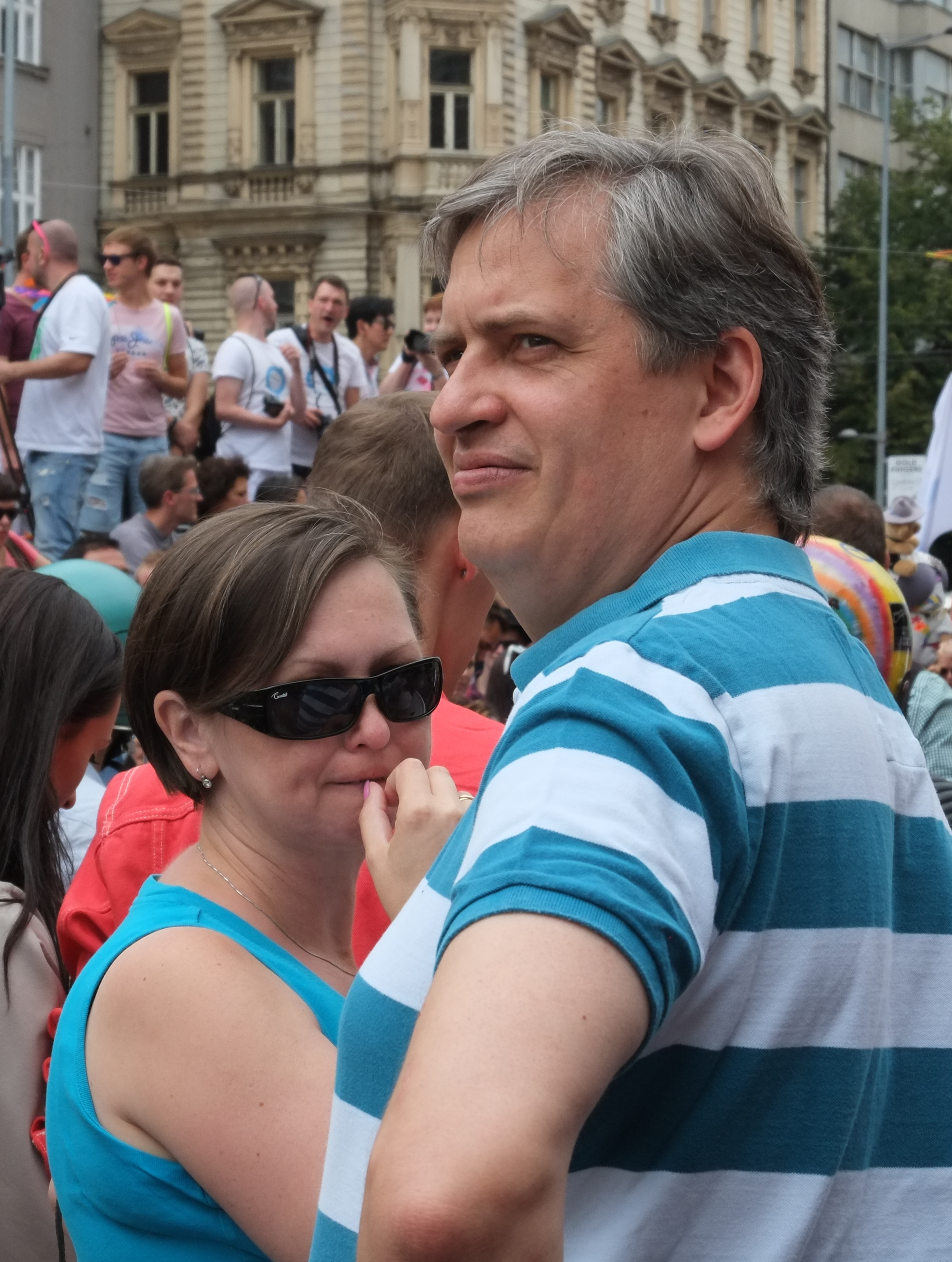 Jiří Dienstbier na Václavském náměstí během Prague Pride 2016.